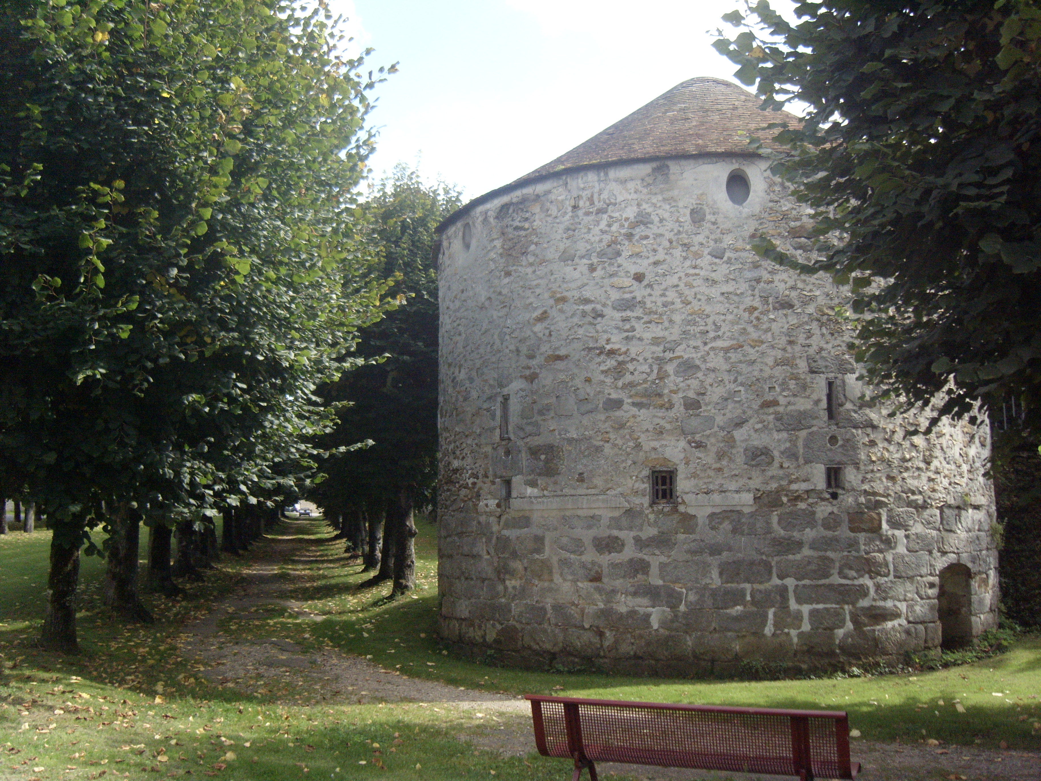 Tour d'angle du rempart de Rozay-en-Brie